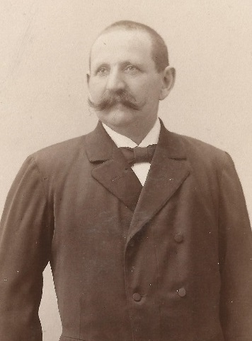 Lenz Gyula (*Pozsony, 1848. március 27.–†Budapest, 1910. december 15.), a budapesti Lenz testvérek cég társtulajdonosa, bérház-tulajdonos. Lenz József (1897-1965) kereskedelmi tanácsos, nagykereskedő édesapja. A fénykép Budapesten készült